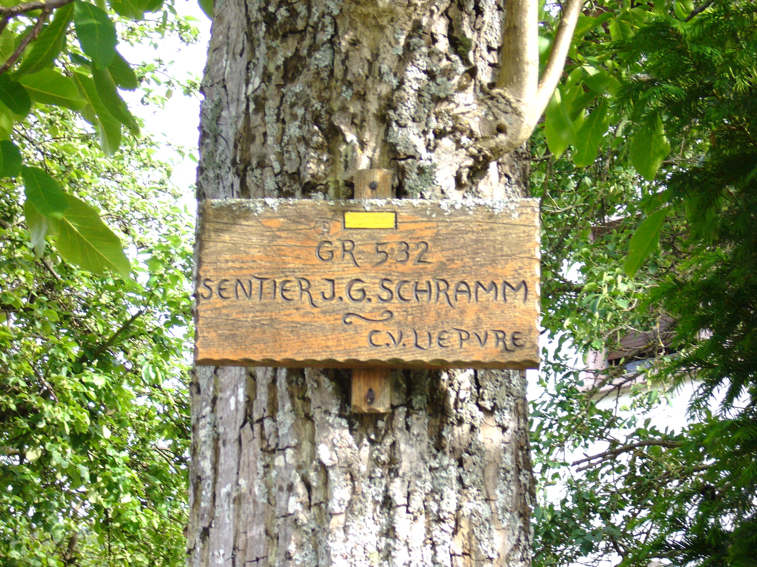 Taennchel 018.JPG